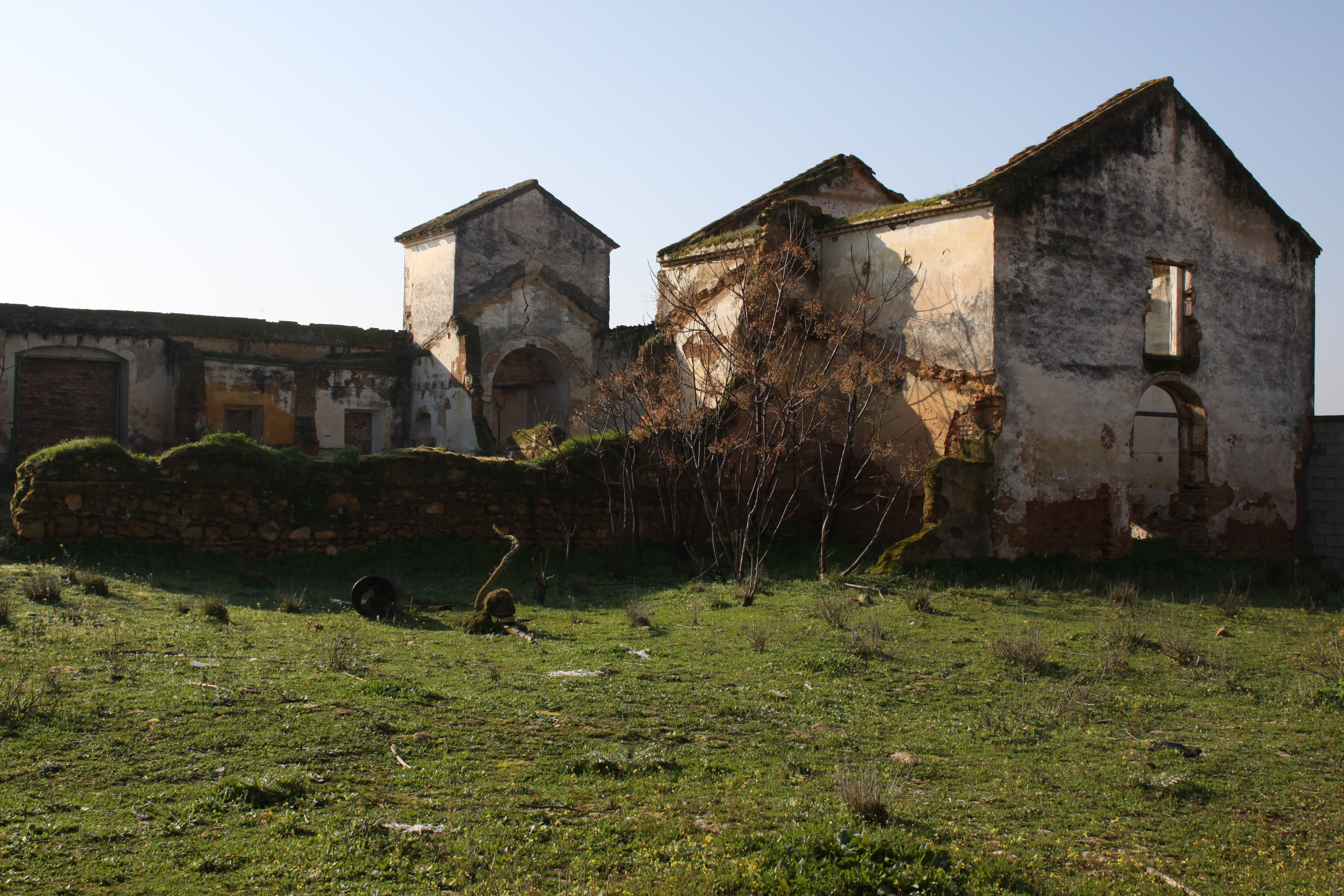 Posada y Molino de Aceite - Gandul, Sevilla (España)